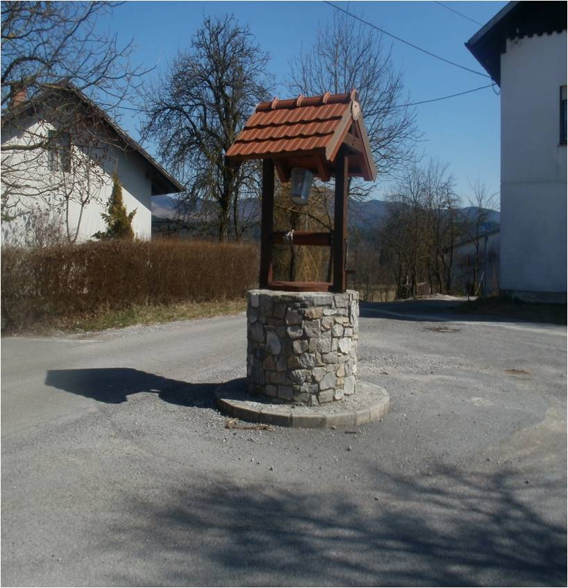 Slika vodnjaka v Grobišču